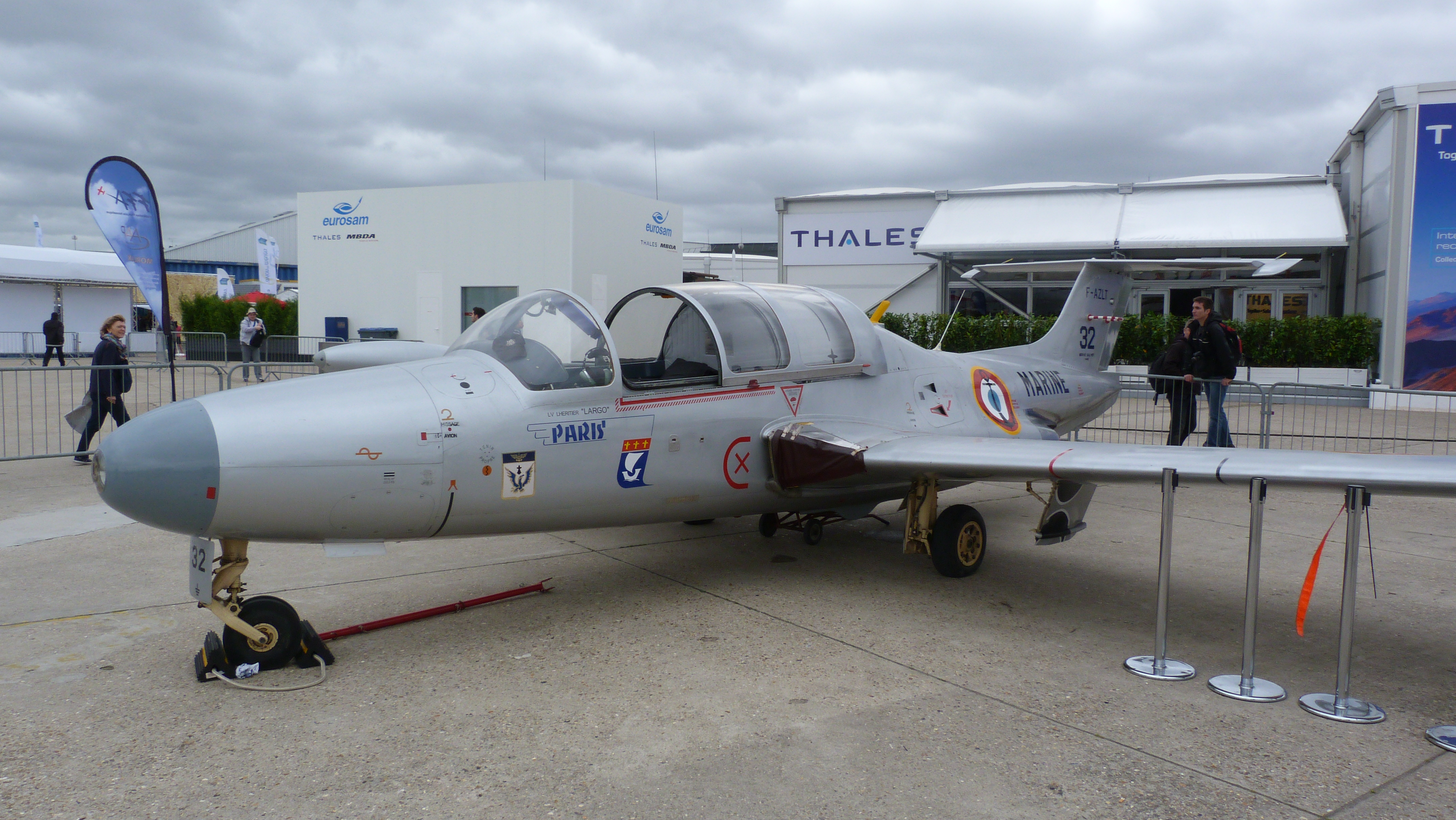 Paris Air Show 2013